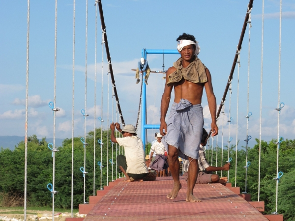 Ponte sul Sar Taung, Mandalay, Myanmar